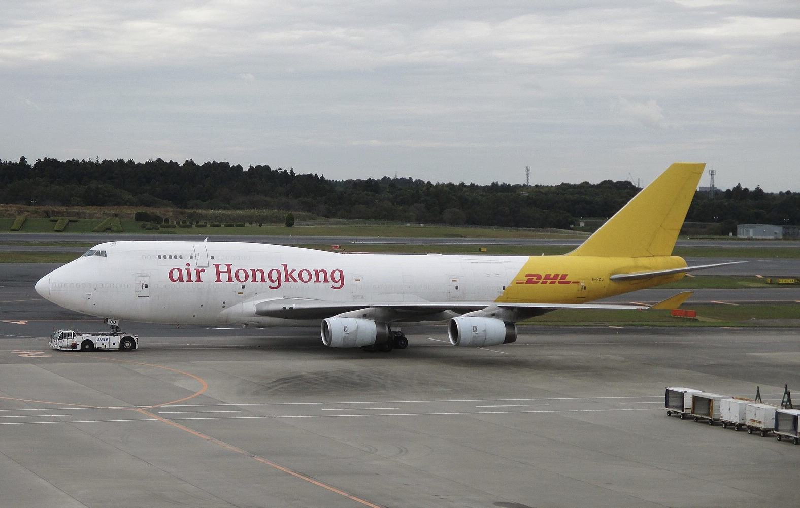 エア・ホンコンのボーイング747‐400型機